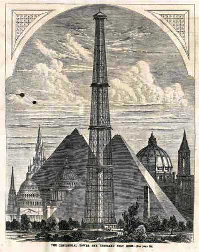 Pylône de 1,000 pieds de hauteur imaginé en 1874 par les ingénieurs américains Clark et Reeves pour l'Exposition universelle de 1876, célébrant le centenaire de l'indépendance américaine. Faute de moyens, la tour ne fut jamais construite.